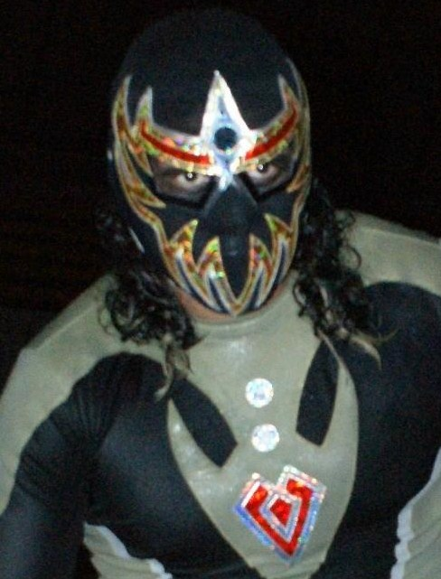 Máscara Dorada, luchador del CMLL, luchando en la Arena Coliseo de Monterrey en diciembre de 2010.